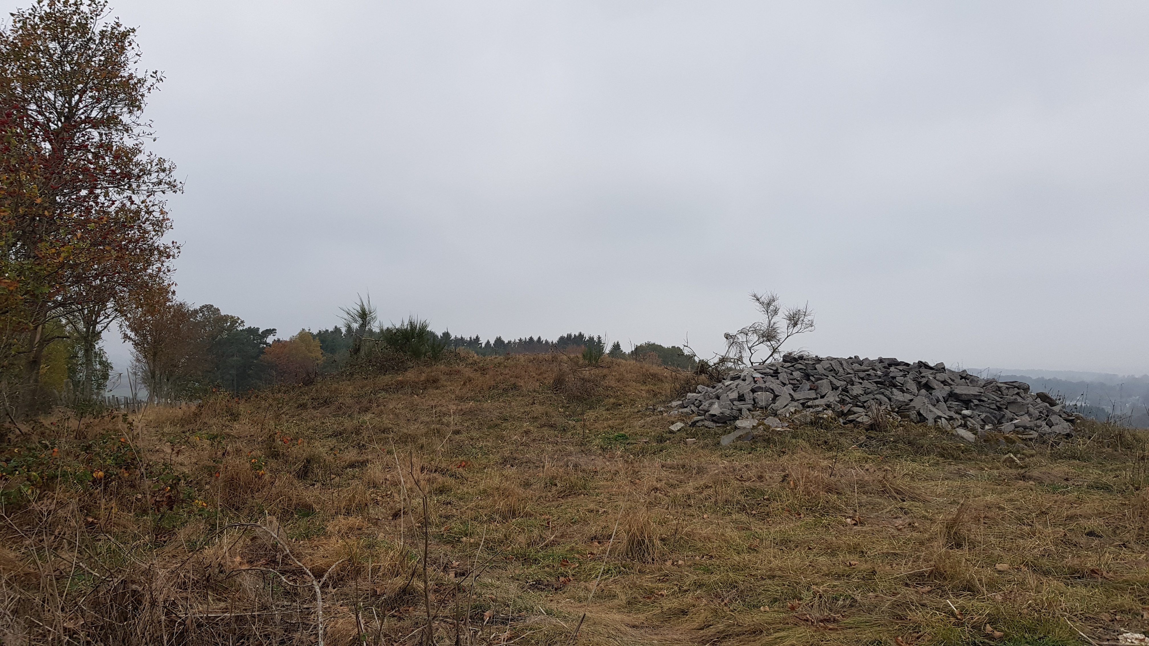 Hügelgräber Schinkelsknopf, Sankt Vith, Belgien This photo of immovable heritage has been taken in the Walloon Region